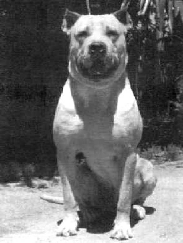 Perro de pelea cordobes